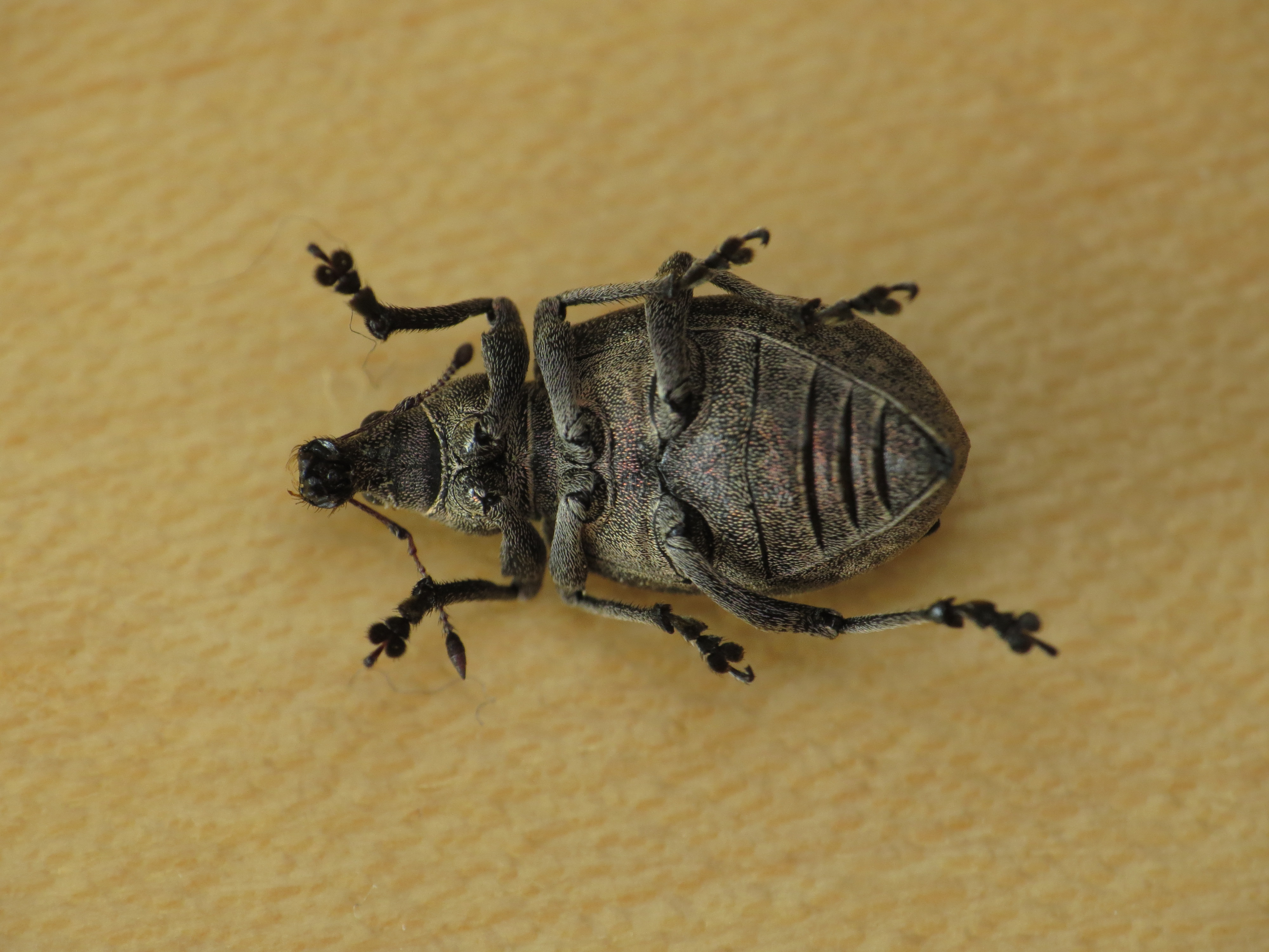 Liophloeus tessulatus (Müller, 1776), Utterslev Mose, Søborg, Denmark, 24 May 2016